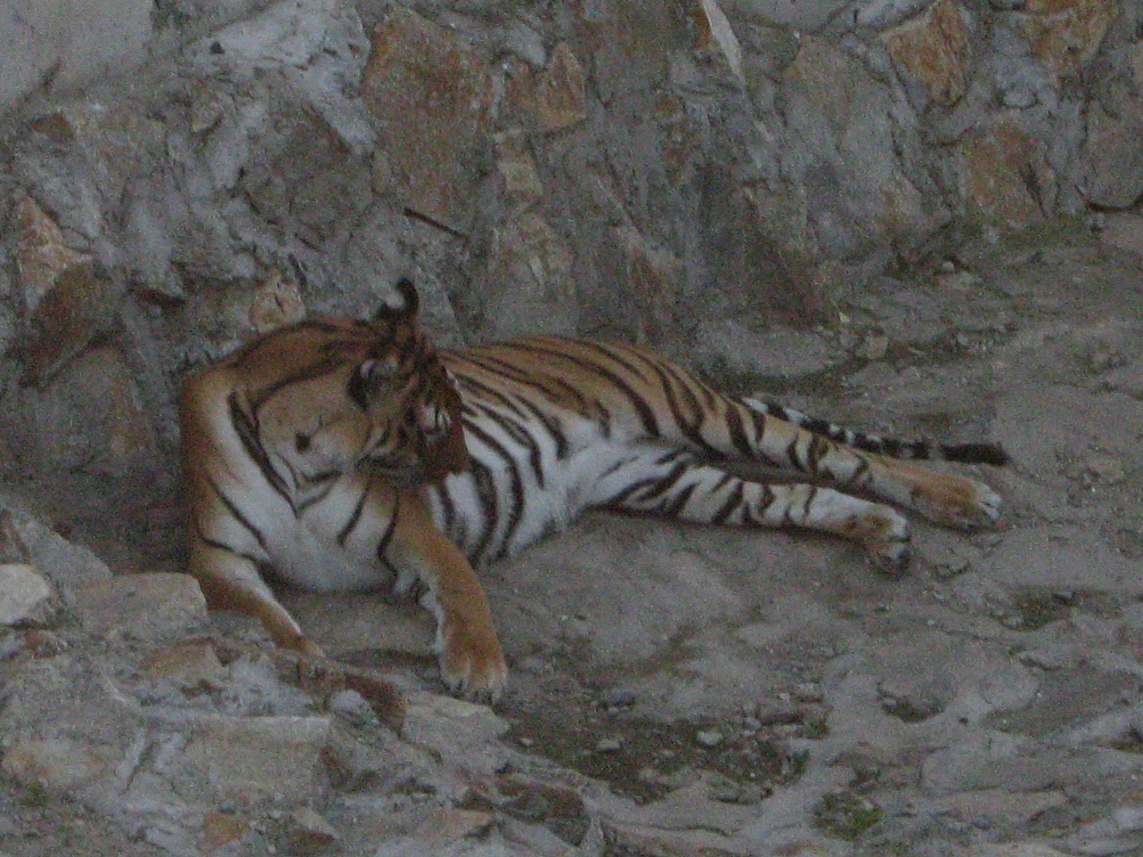 Тигар, заштитни знак врта